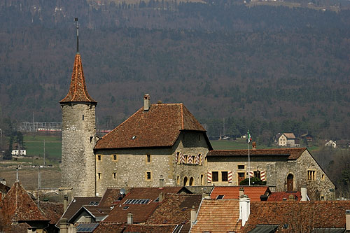 Château Boudry